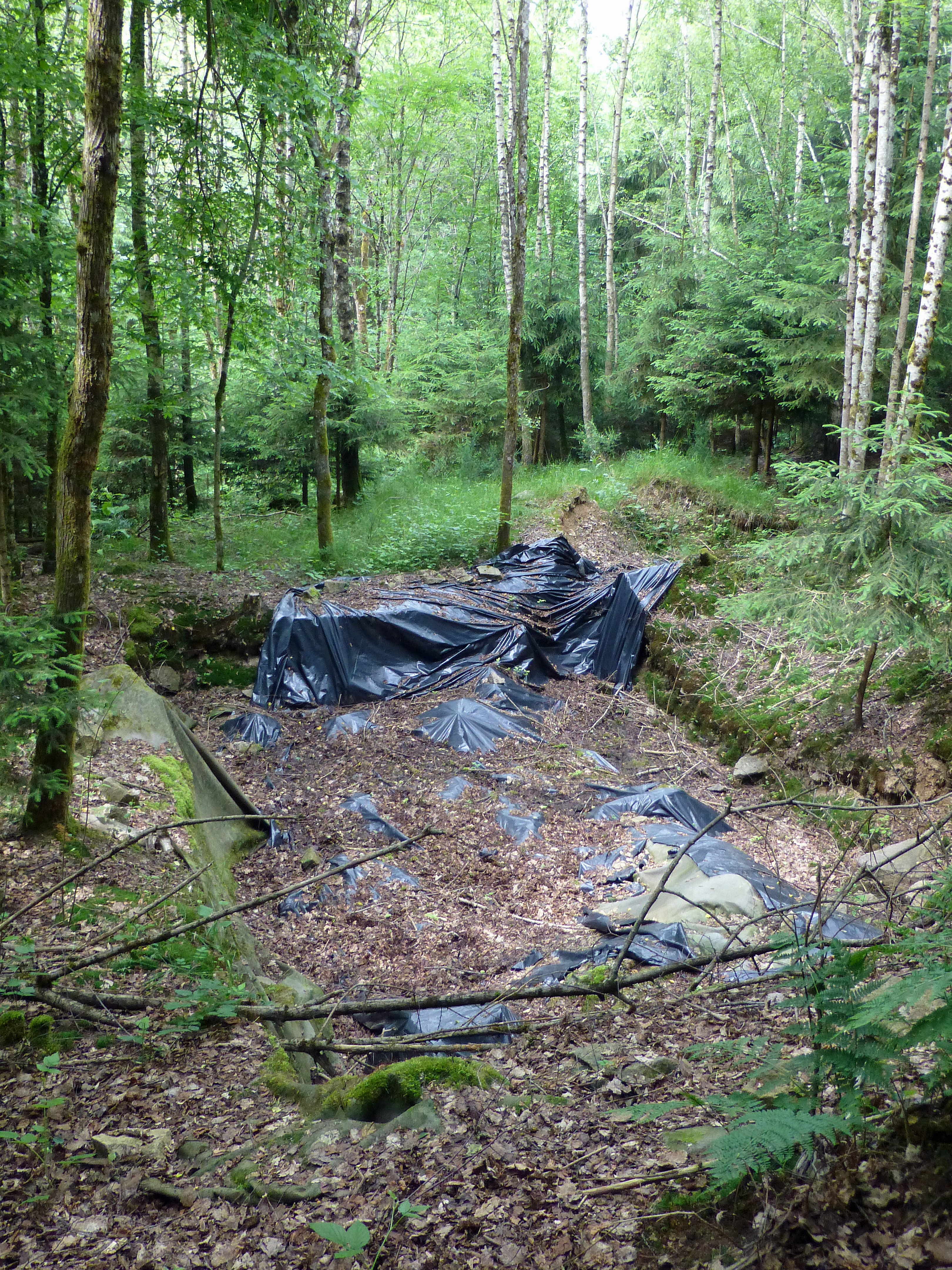 La Salle (Vosges) : fouille programmée en cours sur le site archéologique des Fossottes (carrières de rhyolite)